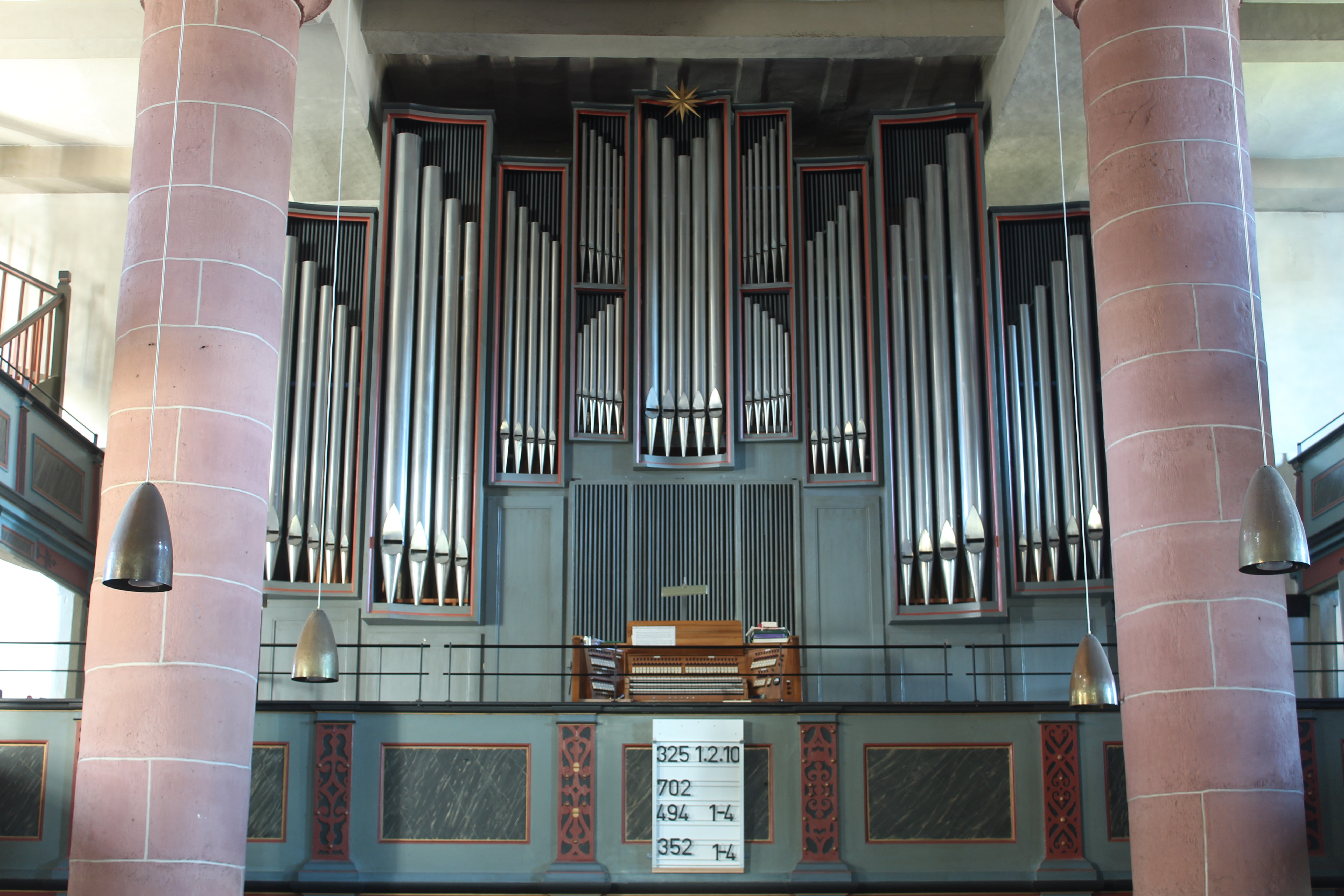 Prospekt der Walker-Orgel der Evangelischen Stadtkirche zu Herborn